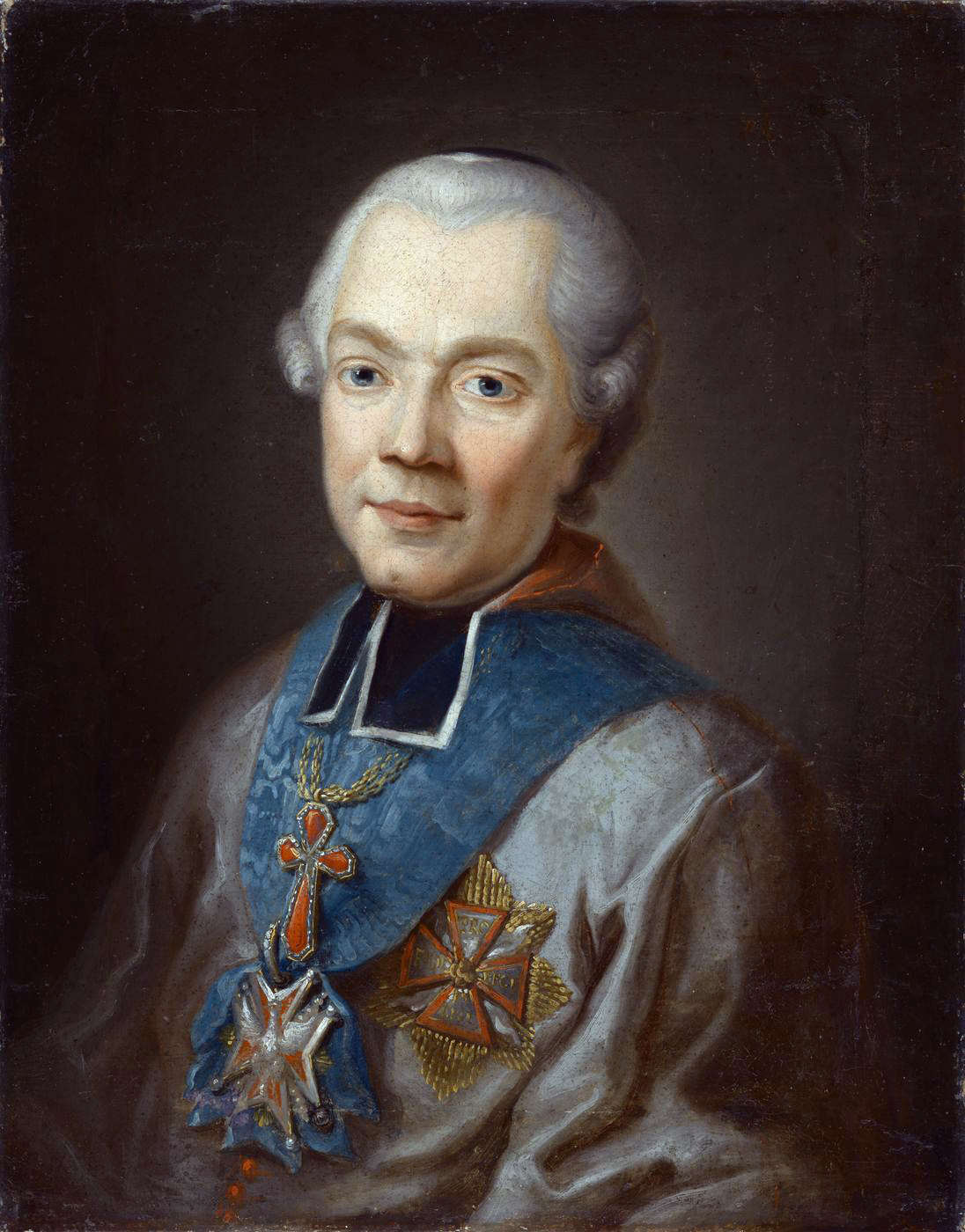 Беларуская (тарашкевіца): Партрэт Ігнація Якуба Масальскага (Ihnaci Jakub Masalski)